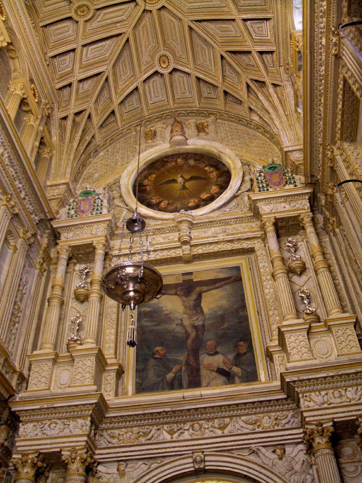 Mezquita-Catedral de Córdoba . Capilla del Espíritu Santo